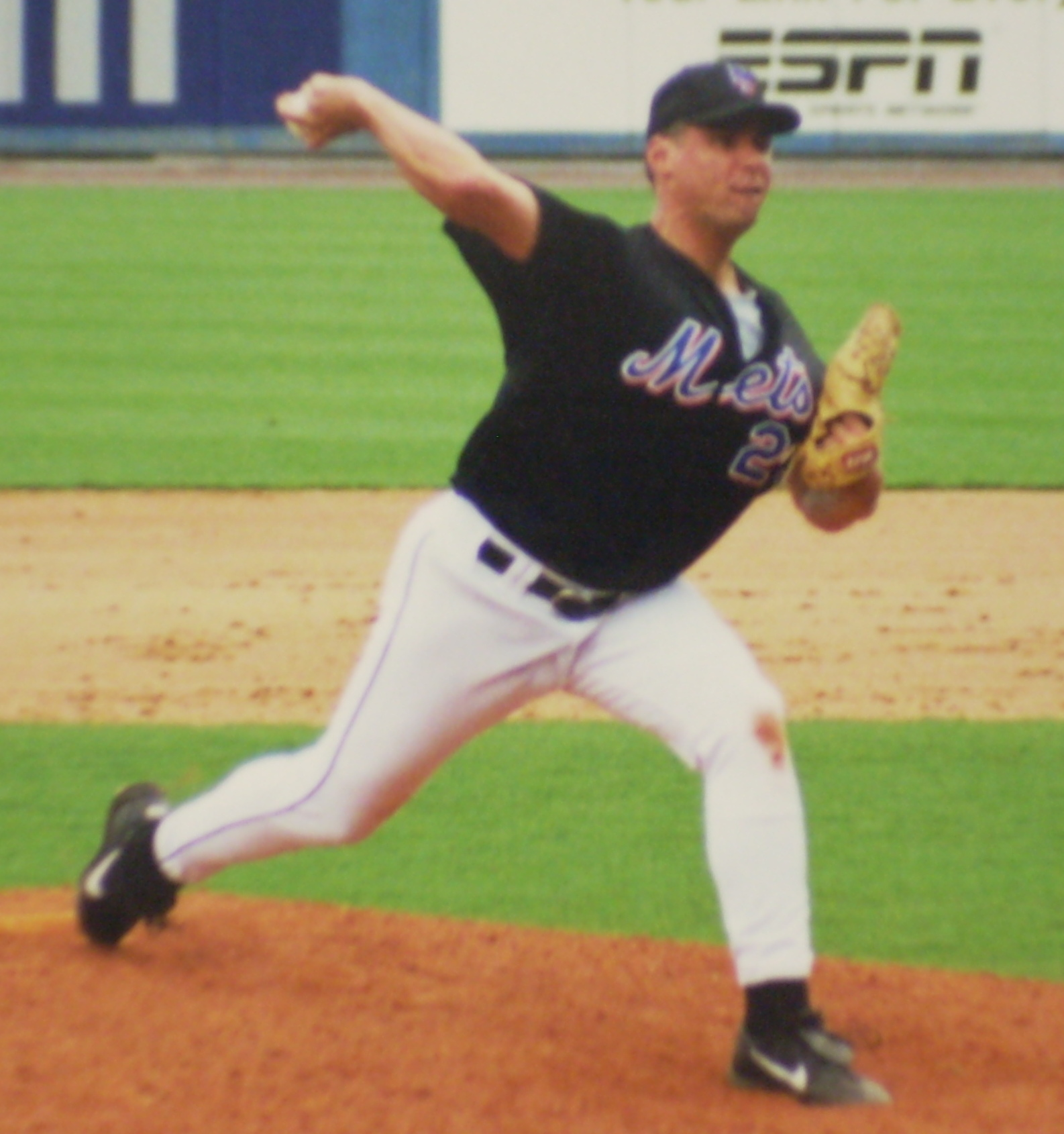 Mark Leiter, New York Mets